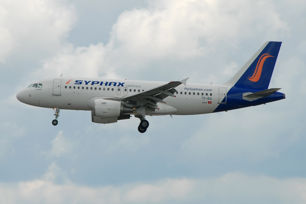 TS-IEG@LGW 05JUN14